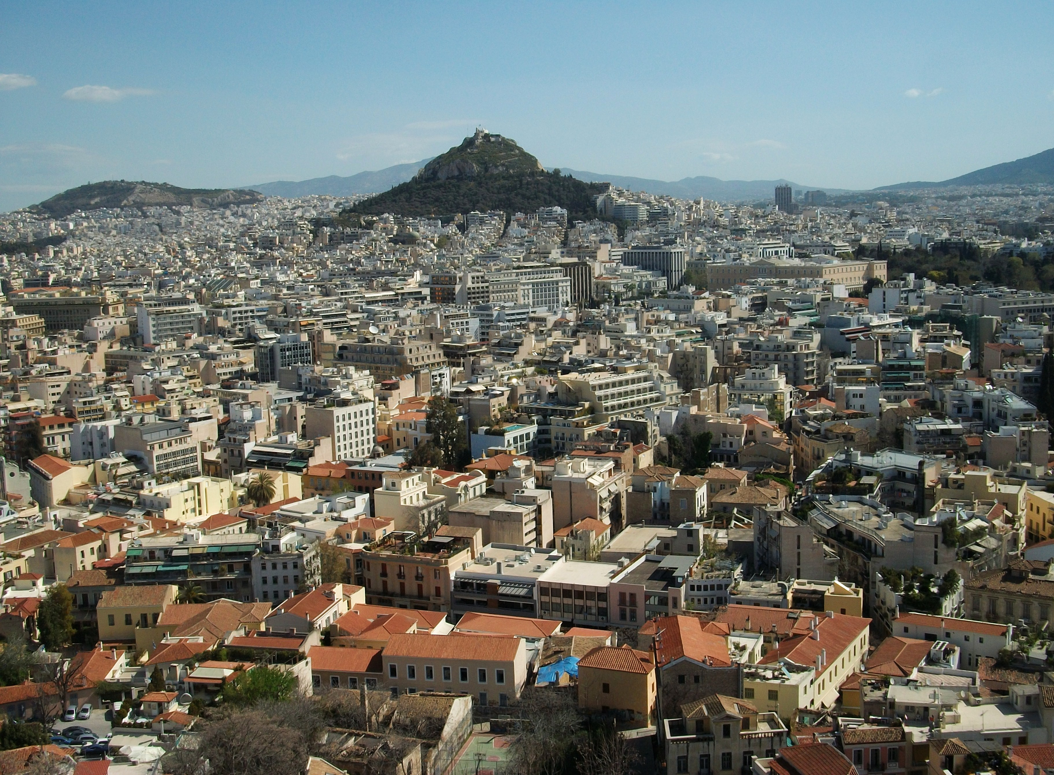 Atenes i el mont Licabet des de l'Acròpoli.